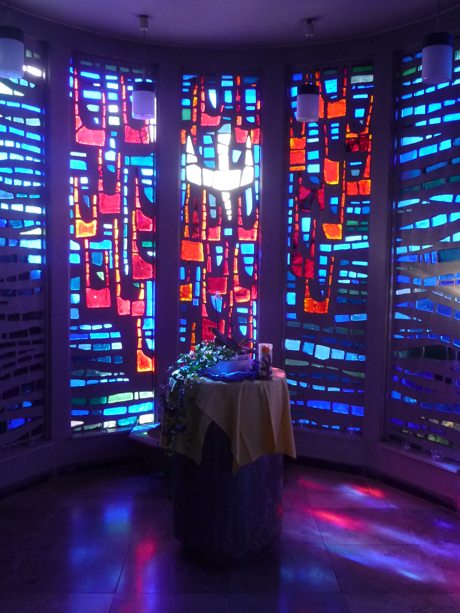 katholische Kirche in Leimersheim, Kreis Germersheim, Rheinland-Pfalz